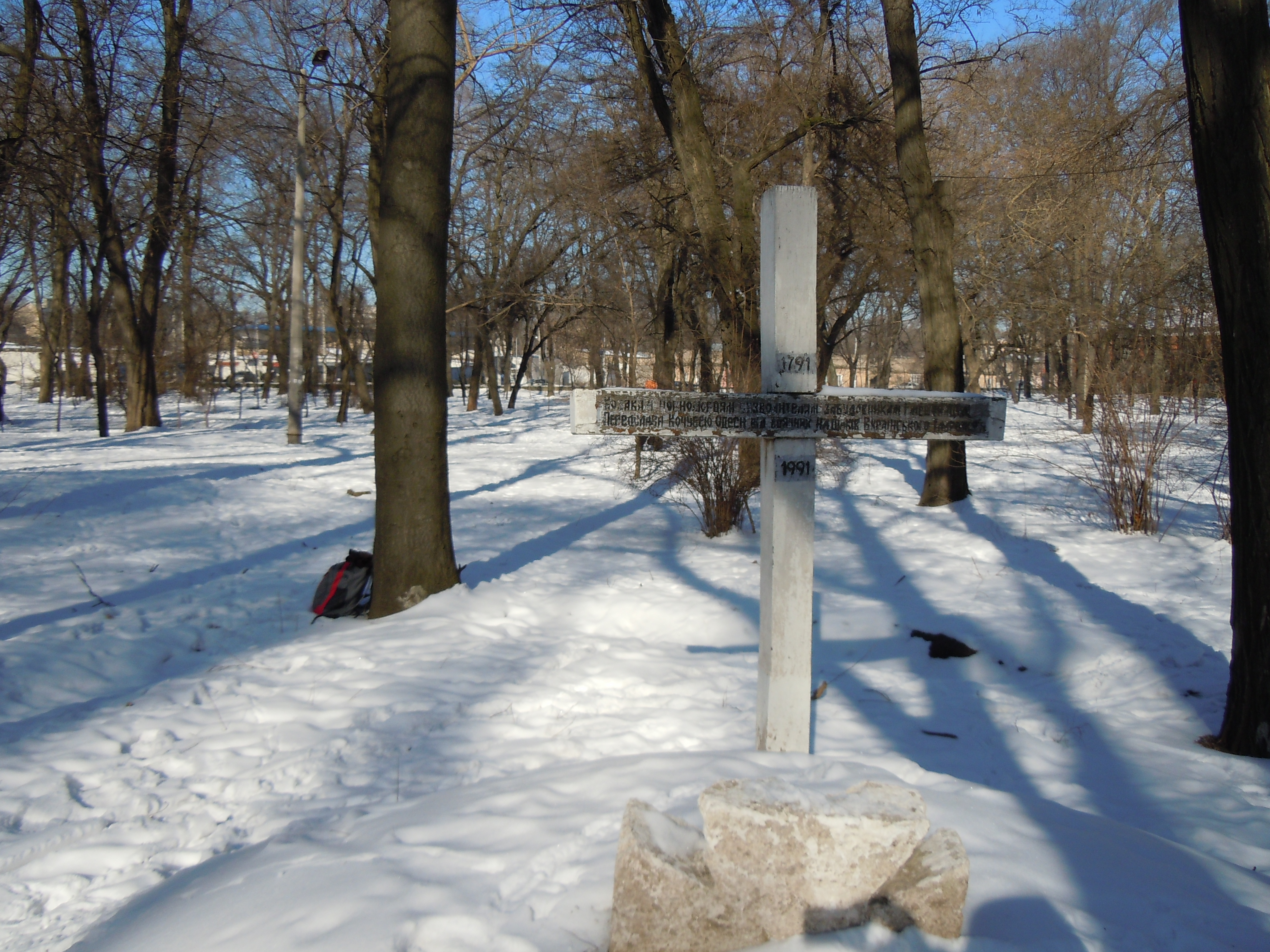 Могила Чорноморських козаків у Преображенському парку (колишнє 1-е Християнське кладовище)